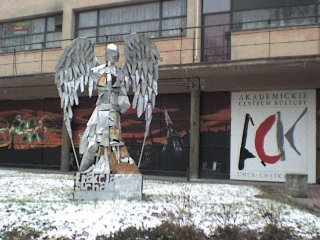 Akademickie Centrum Kultury UMCS "Chatka Żaka".